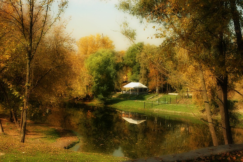 Щёлково